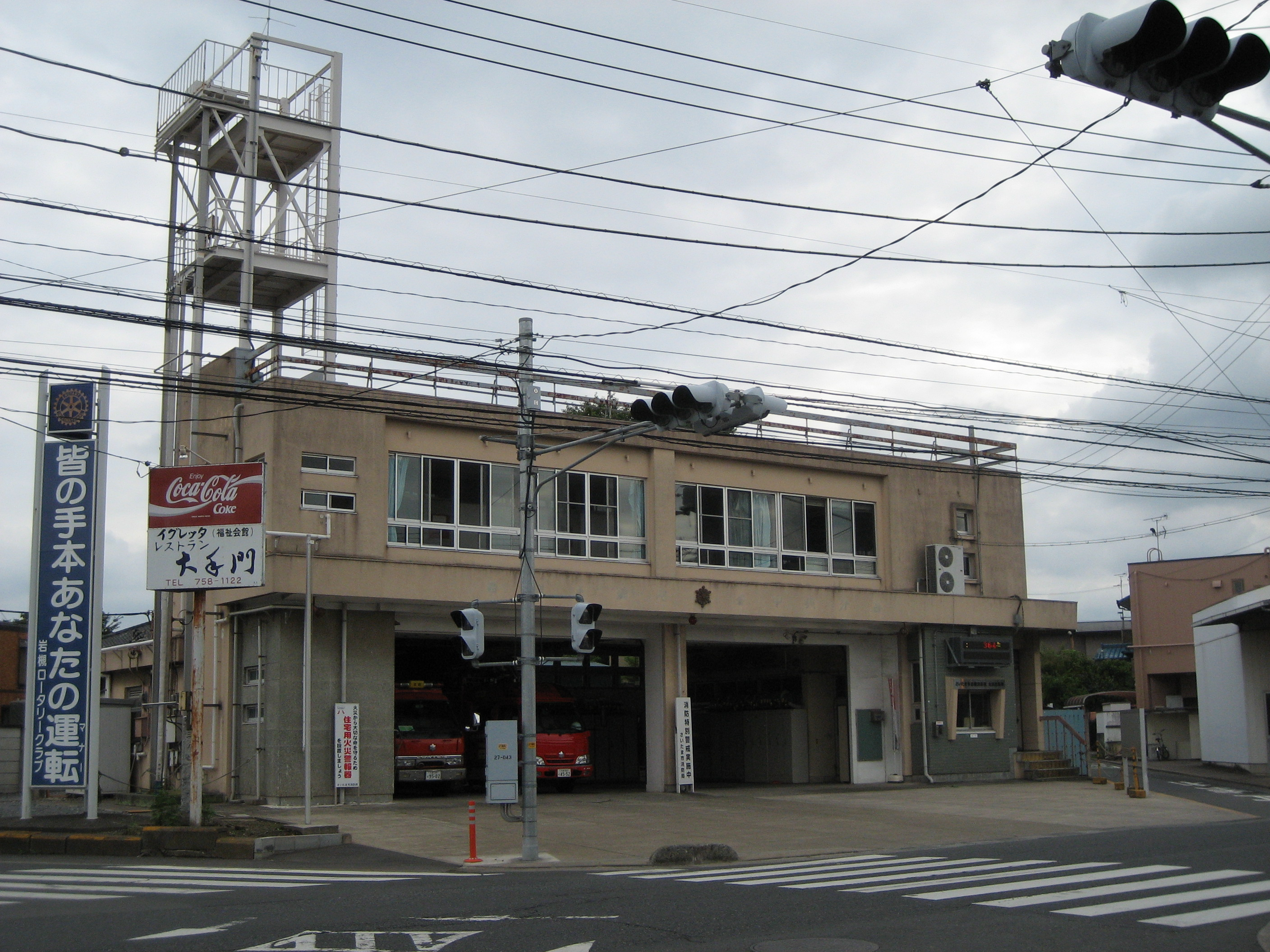 さいたま市消防局岩槻消防署太田出張所庁舎